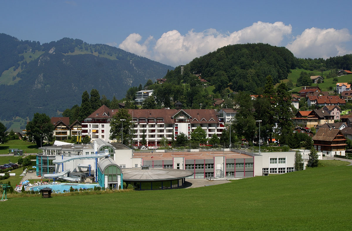 Freizeitpark in Morschach